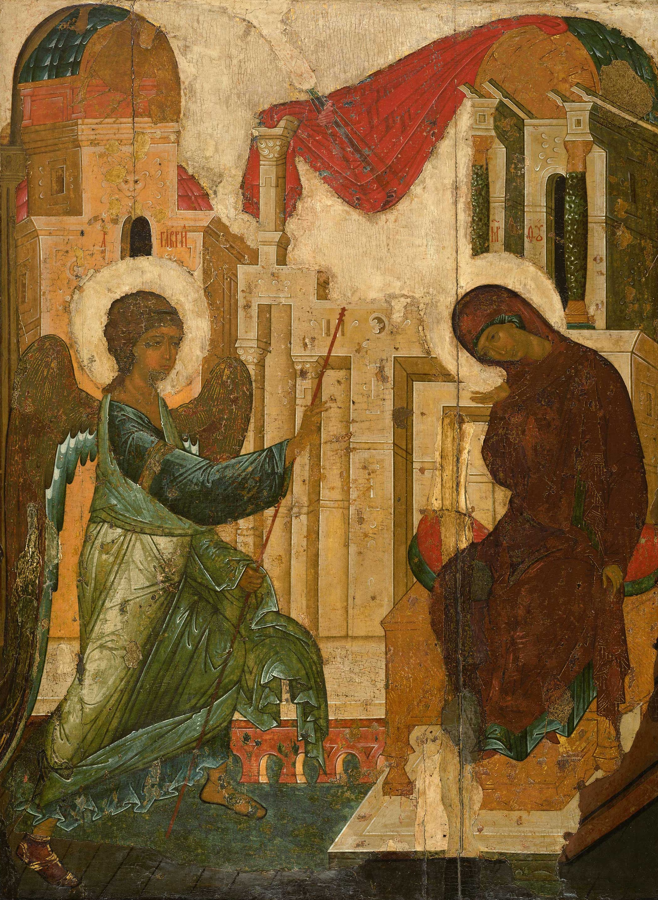 Благовещение. 1408. НЕ Андрей Рублёв. 125 × 94 см Государственная Третьяковская галерея, Москва, Россия Инв. 22951 Происходит из праздничного чина Успенского собора во Владимире